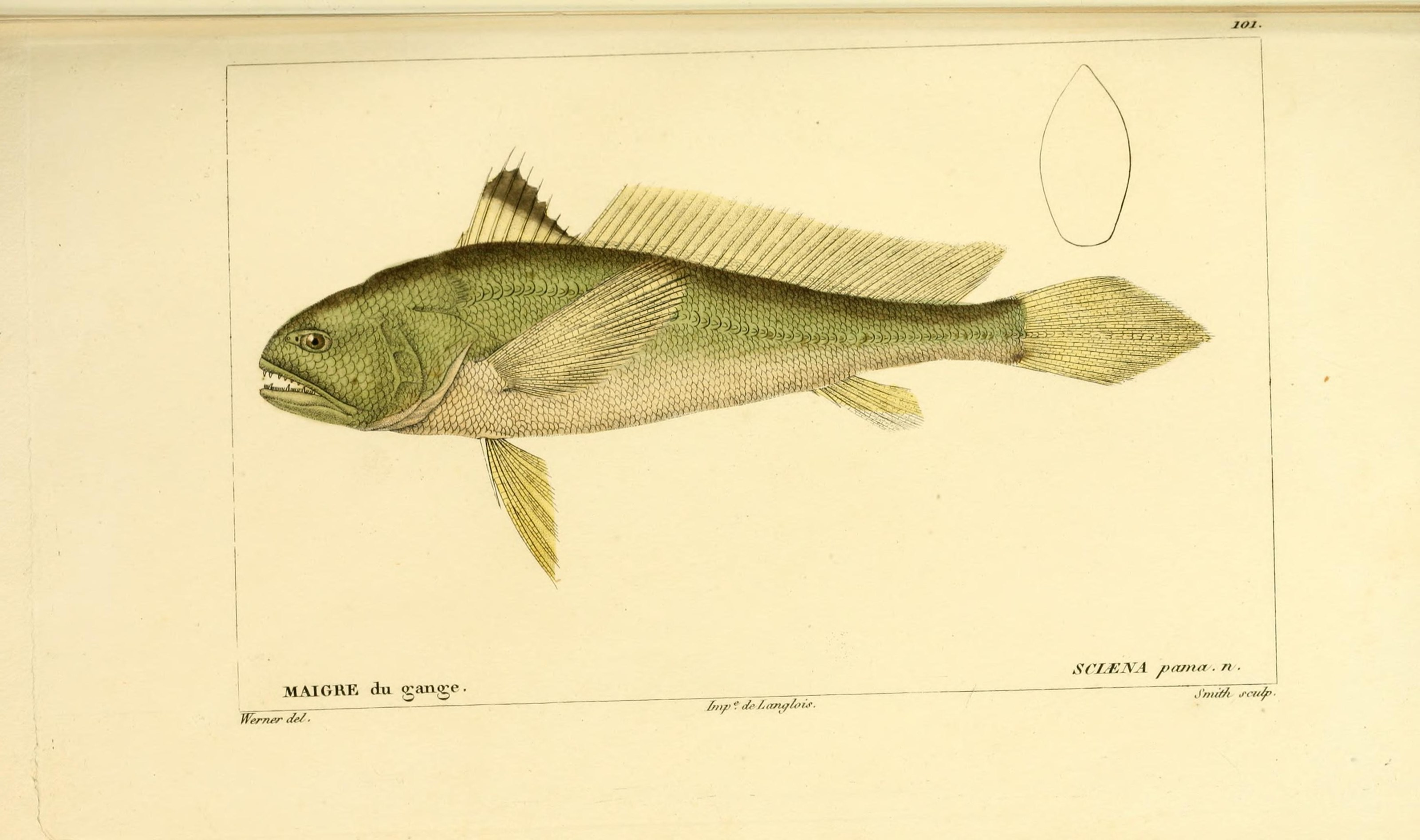 Otolithoides pama syn. Sciaena pama